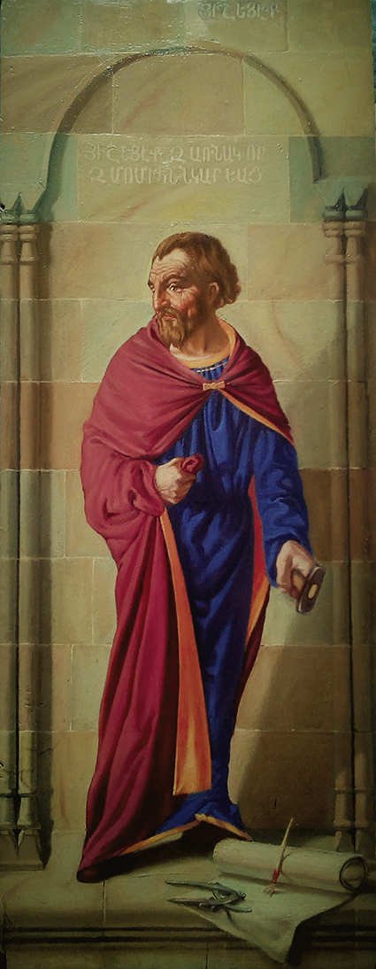 Մոմիկ, փայտ, յուղաներկ 20/09/2018